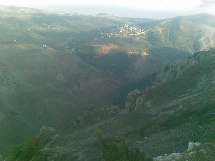 وادي جهنّم - بين بلدة عبا و بلدة أنصار